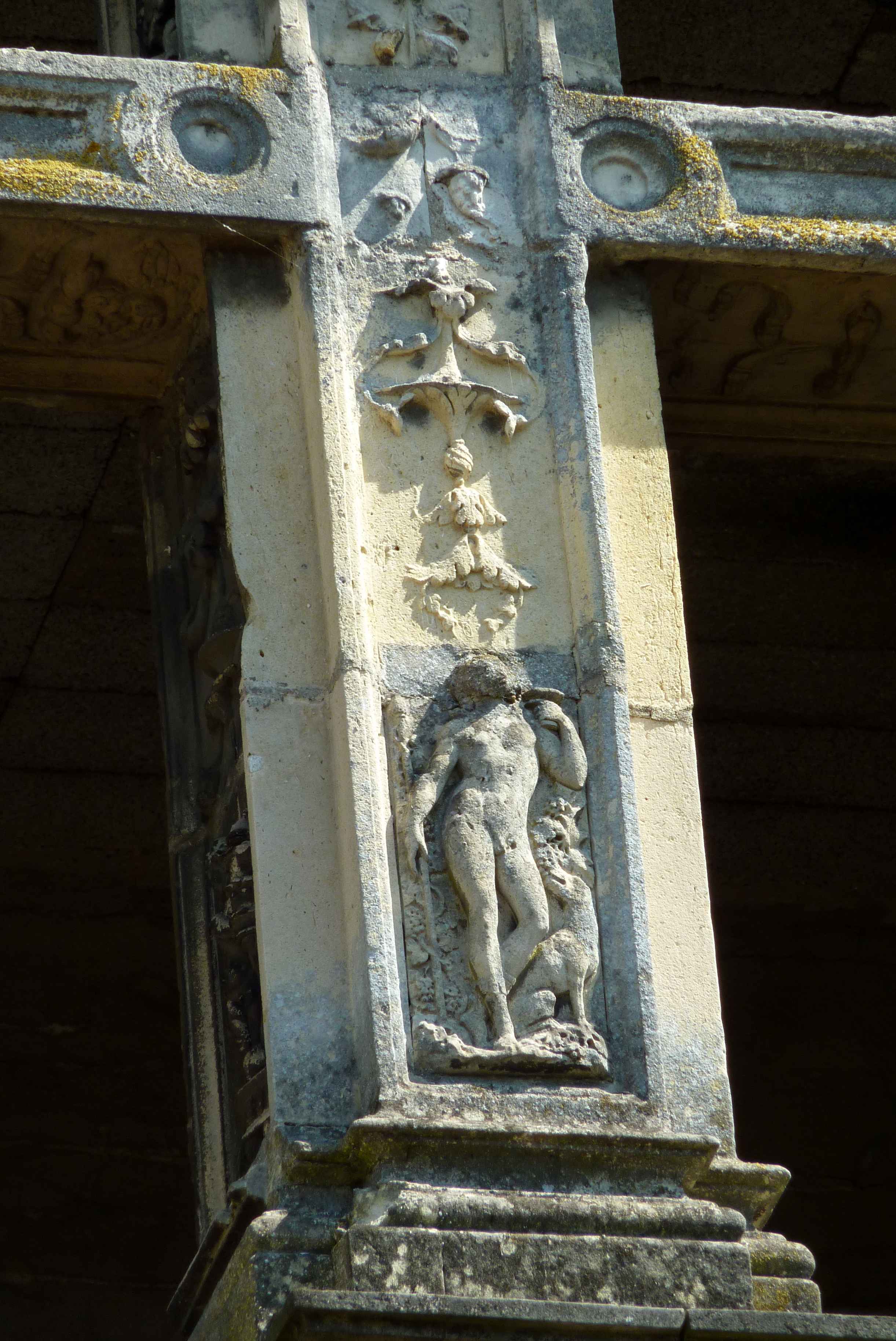 Hôtel Chabouillé in Moret-sur-Loing im Département Seine-et-Marne in der Region Île-de-France (Frankreich), Renaissancefassade